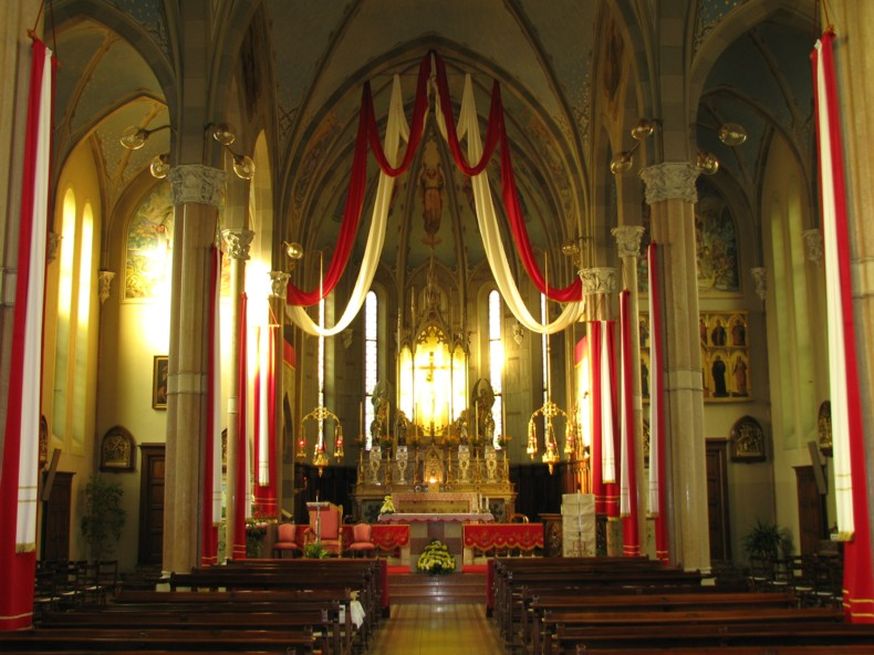 Desio, interno del Santuario del Crocifisso.